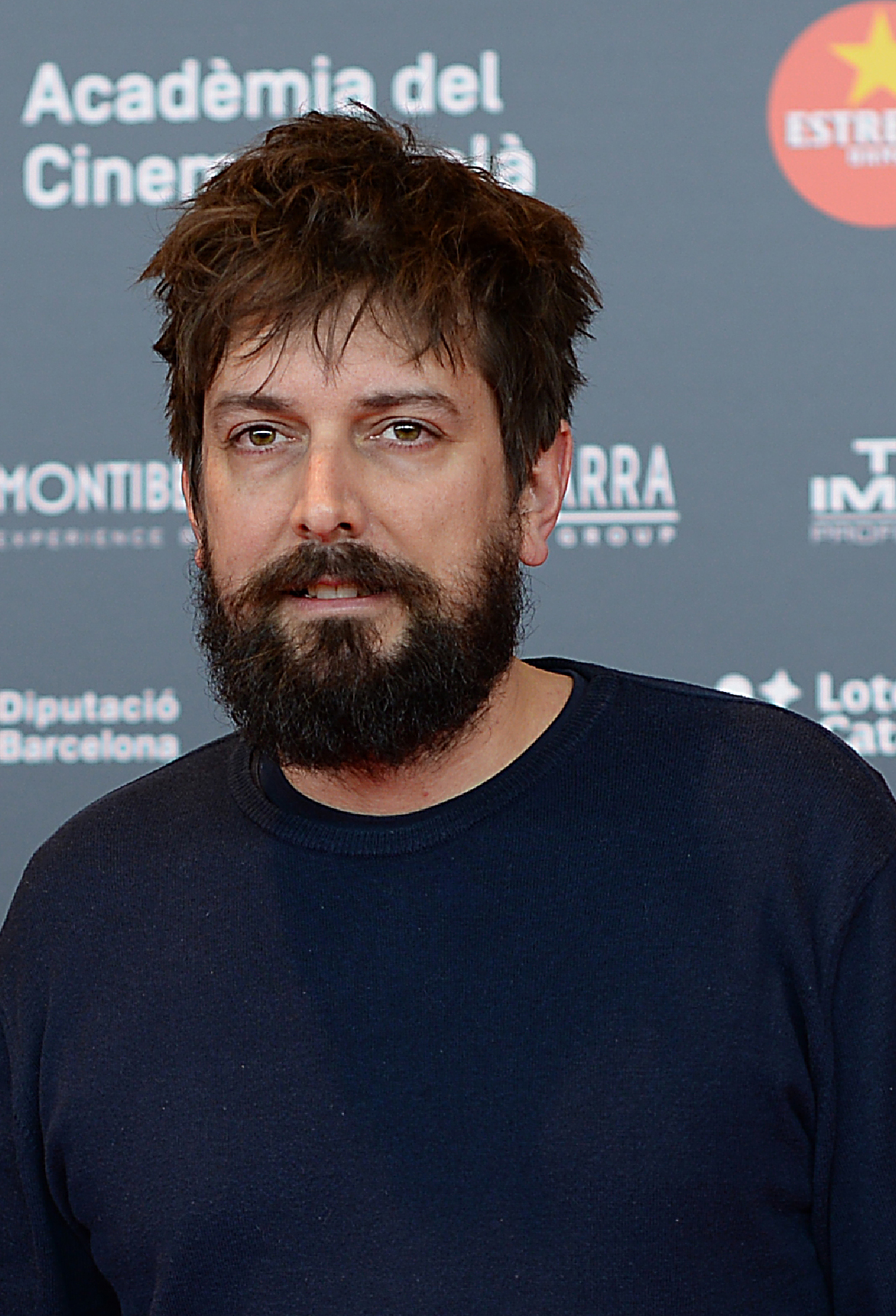 Pau Vallvé, cantant, XII Premis Gaudí (2020)